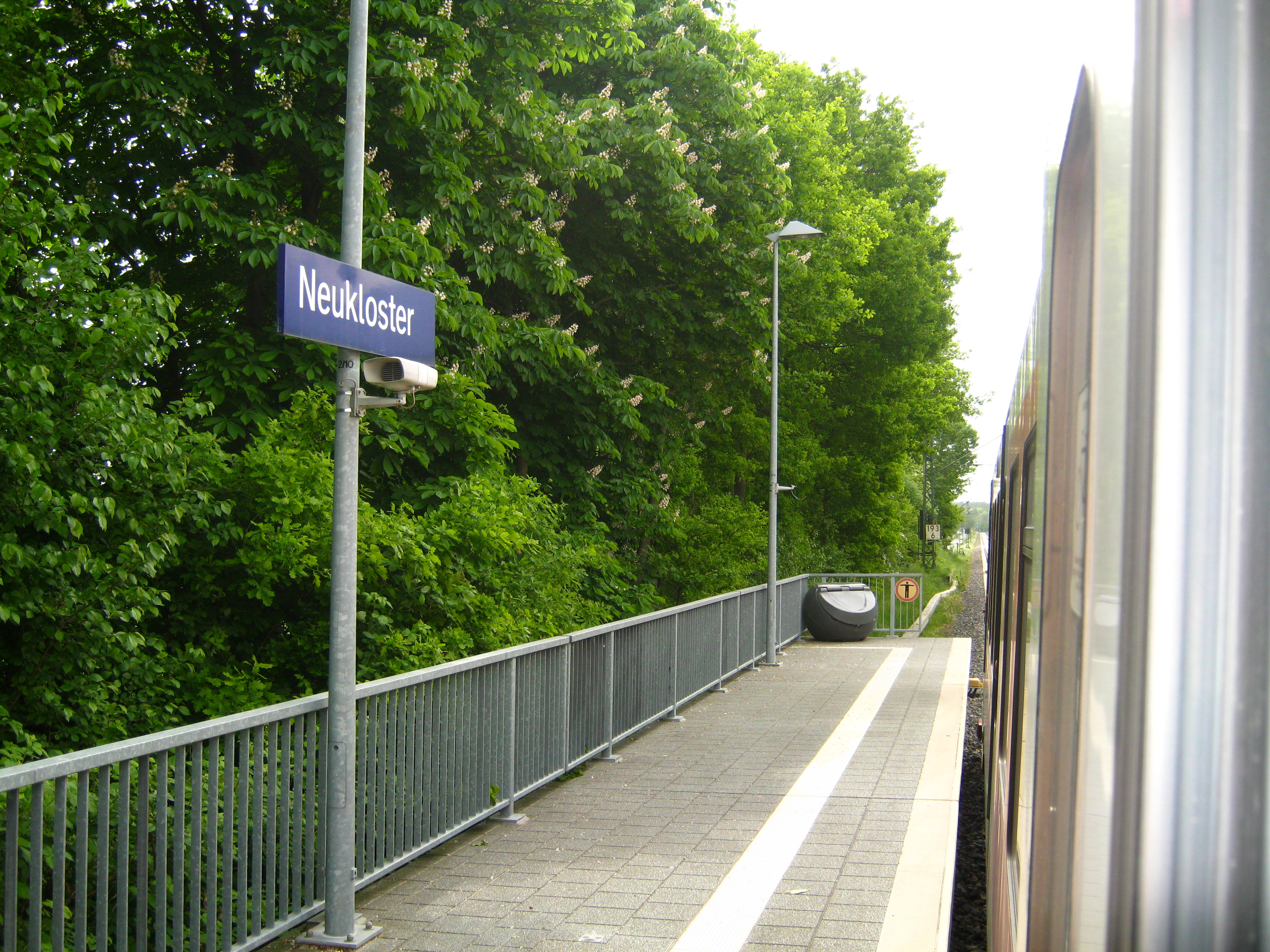 S-Bahn-Station Neukloster.